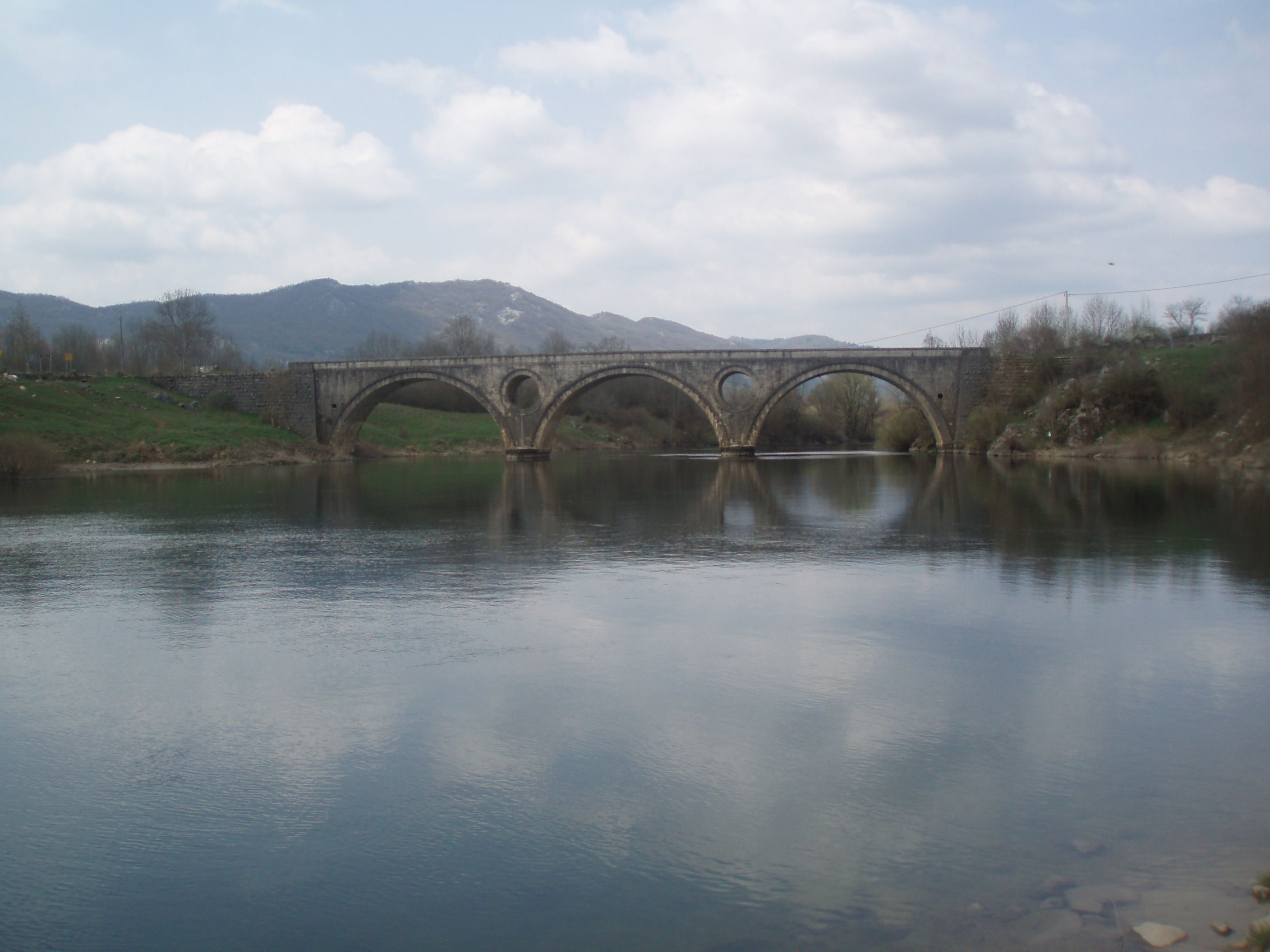 Kosinjski most